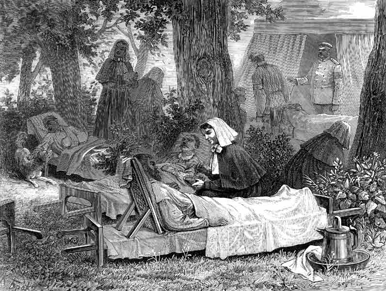 Set up a camp in the Balkans. 1877